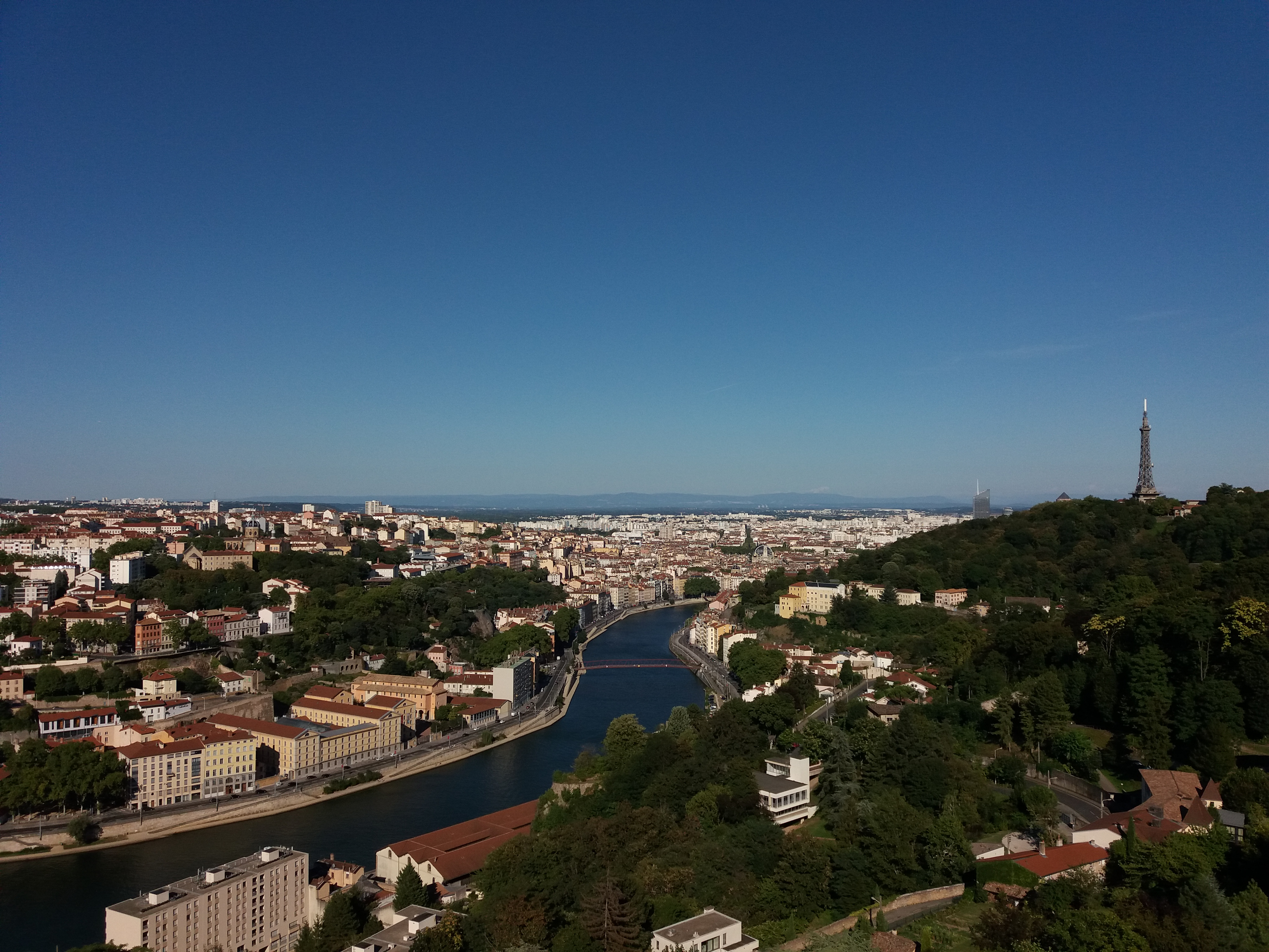 Vue sur la Saône depuis le toit d'un immeuble montée de l'Observance : aval avec le Mont Blanc.